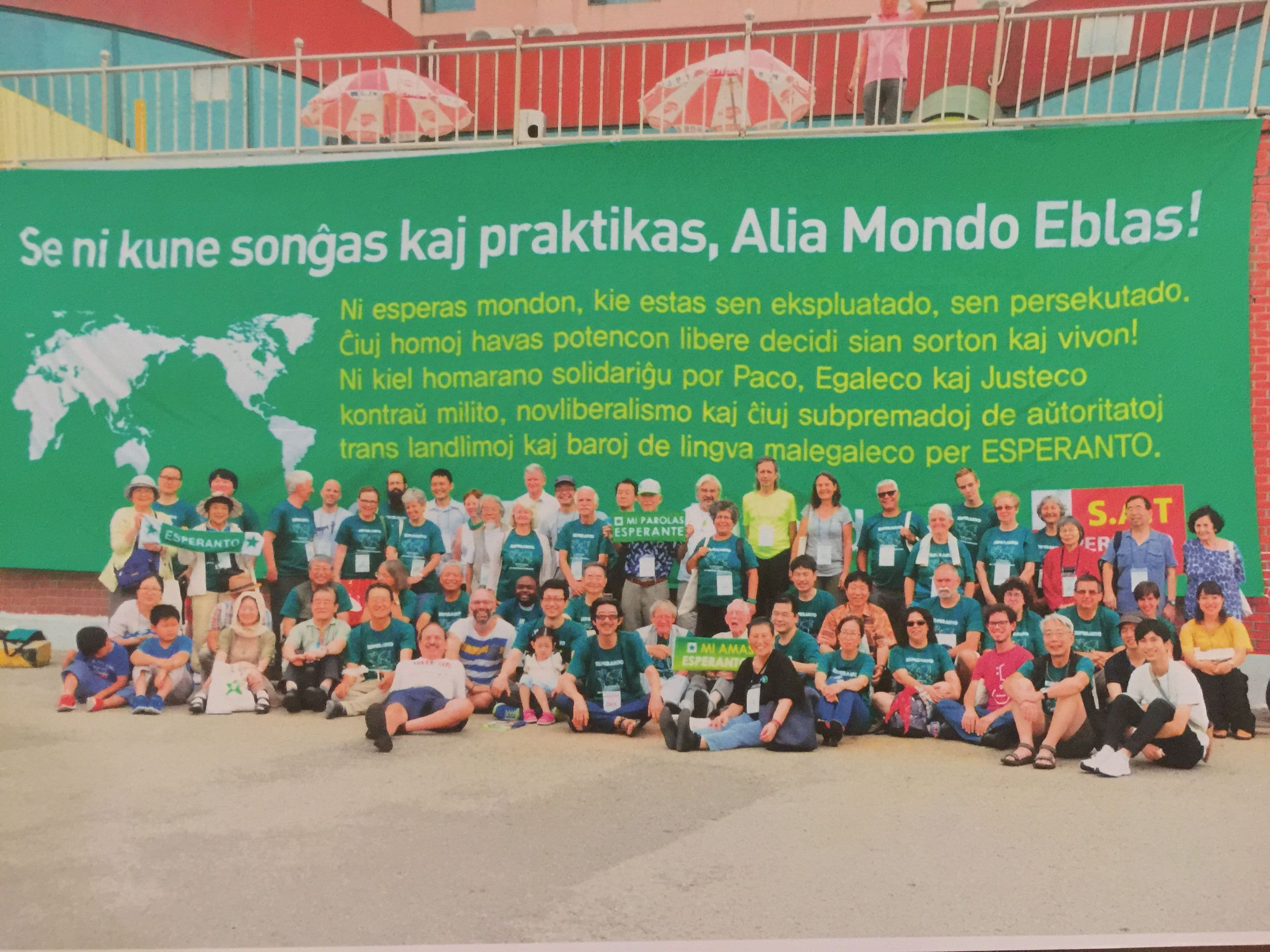 Kongresanoj de 90-a SAT-Kongreso 2017